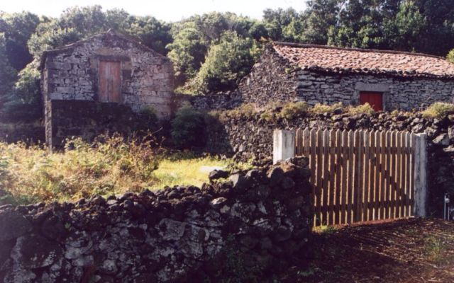 Adegas in Faja auf der Azoreninsel Faial